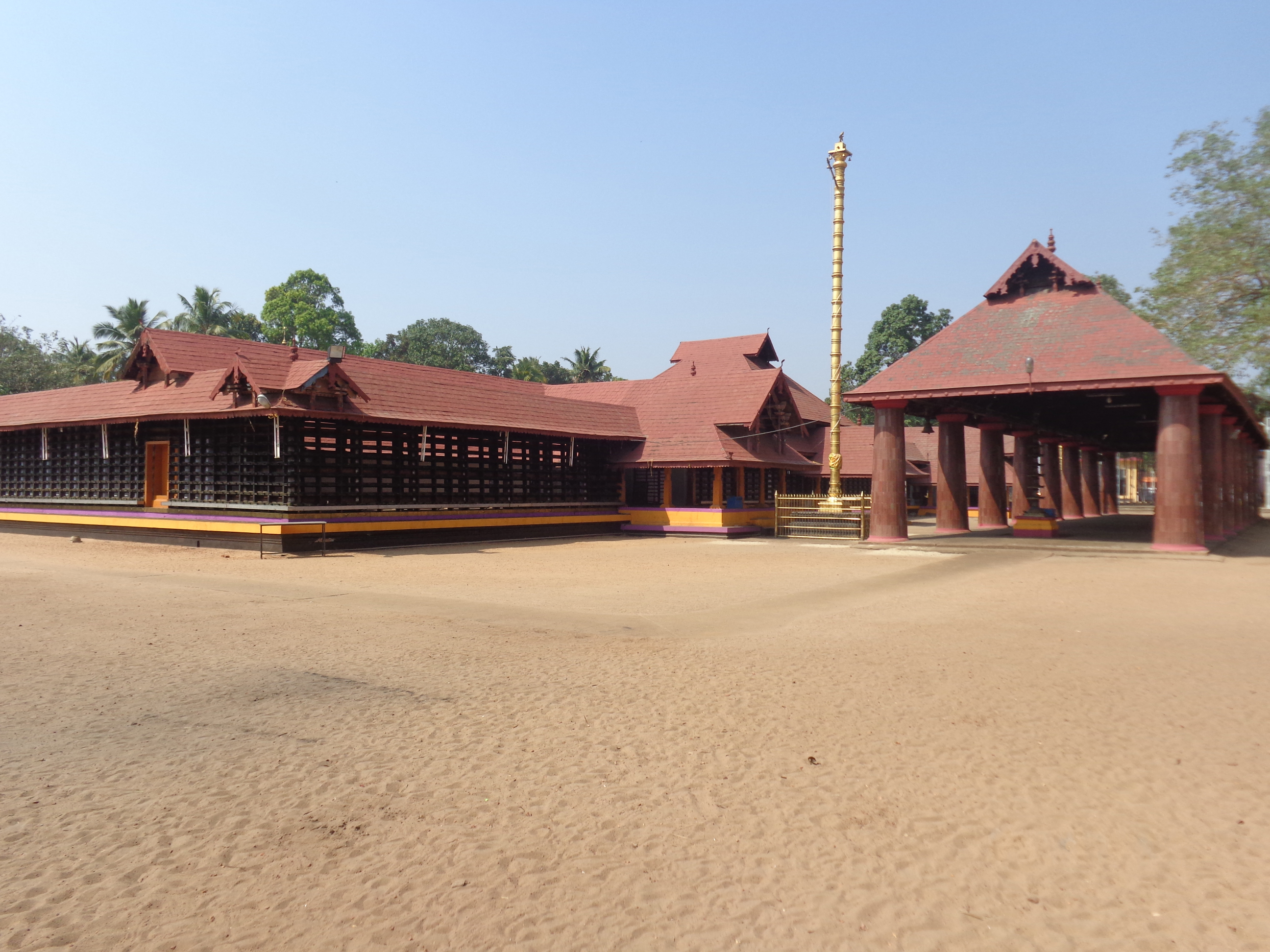 Thuravoor temple a good view, cherthala thaluk, alappuzha Dist, Kerala. INDIA